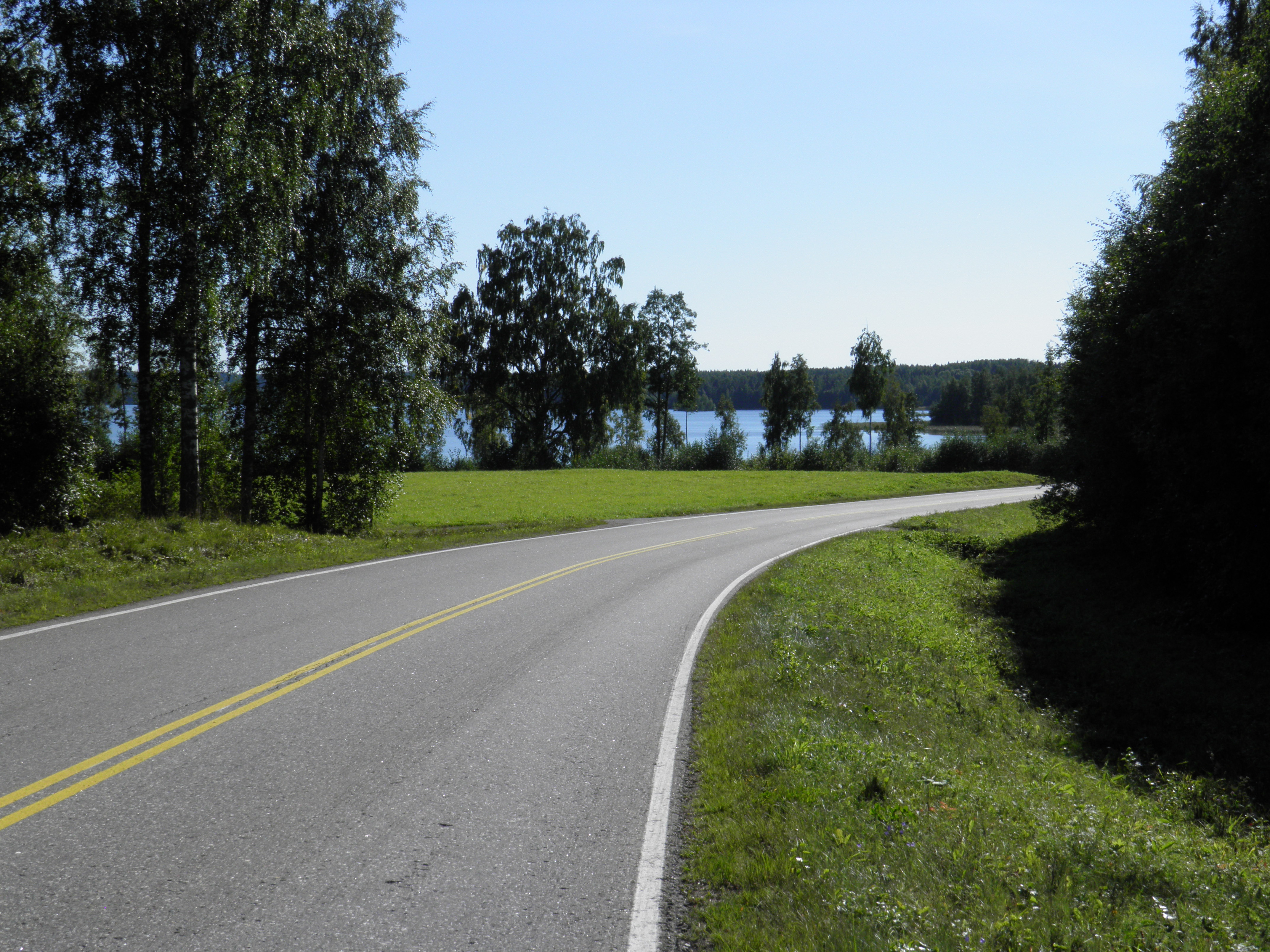 Seututie 317 Hämeenlinnan Lammilla länteen päin, taustalla Pääjärvi.